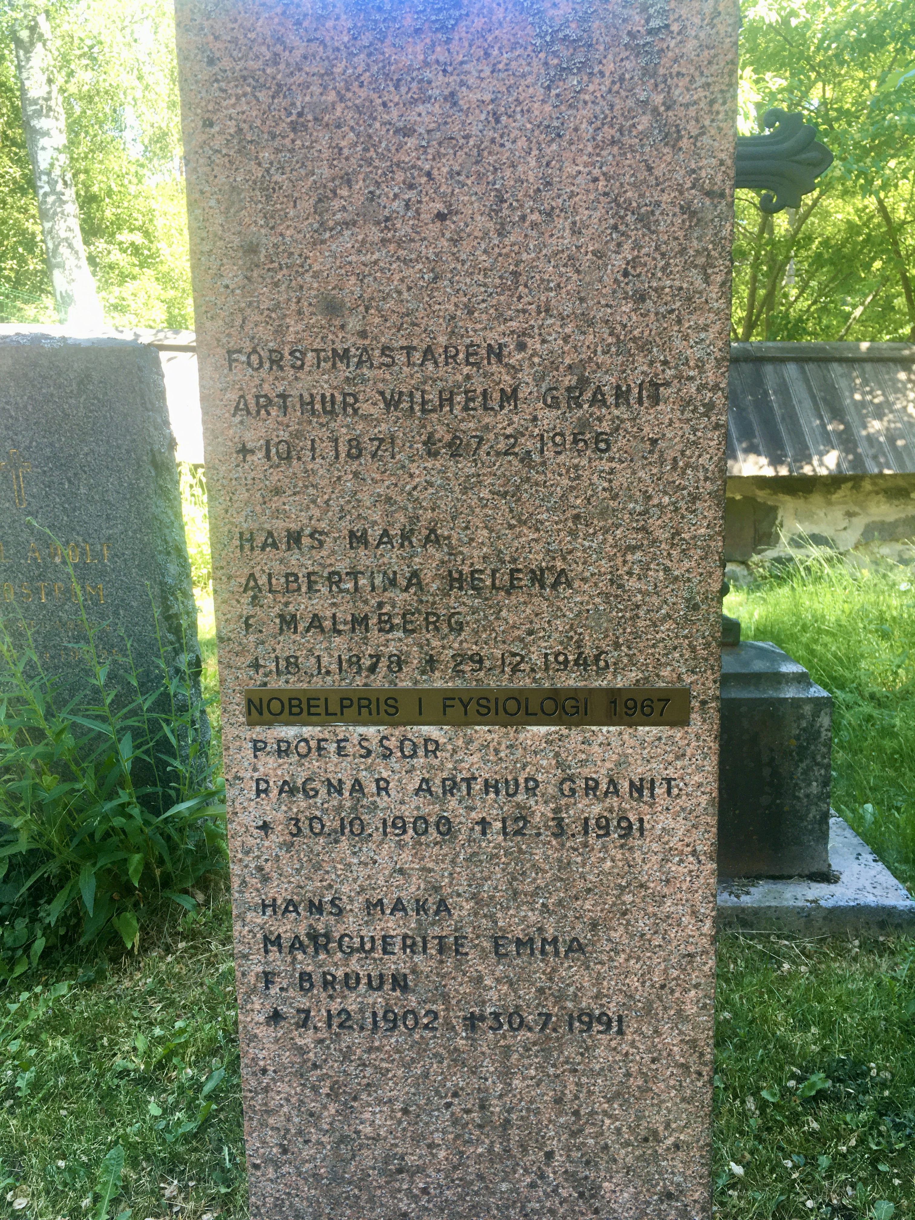 Ragnar Granitin hautakivi Korppoon kirkon hautausmaalla.